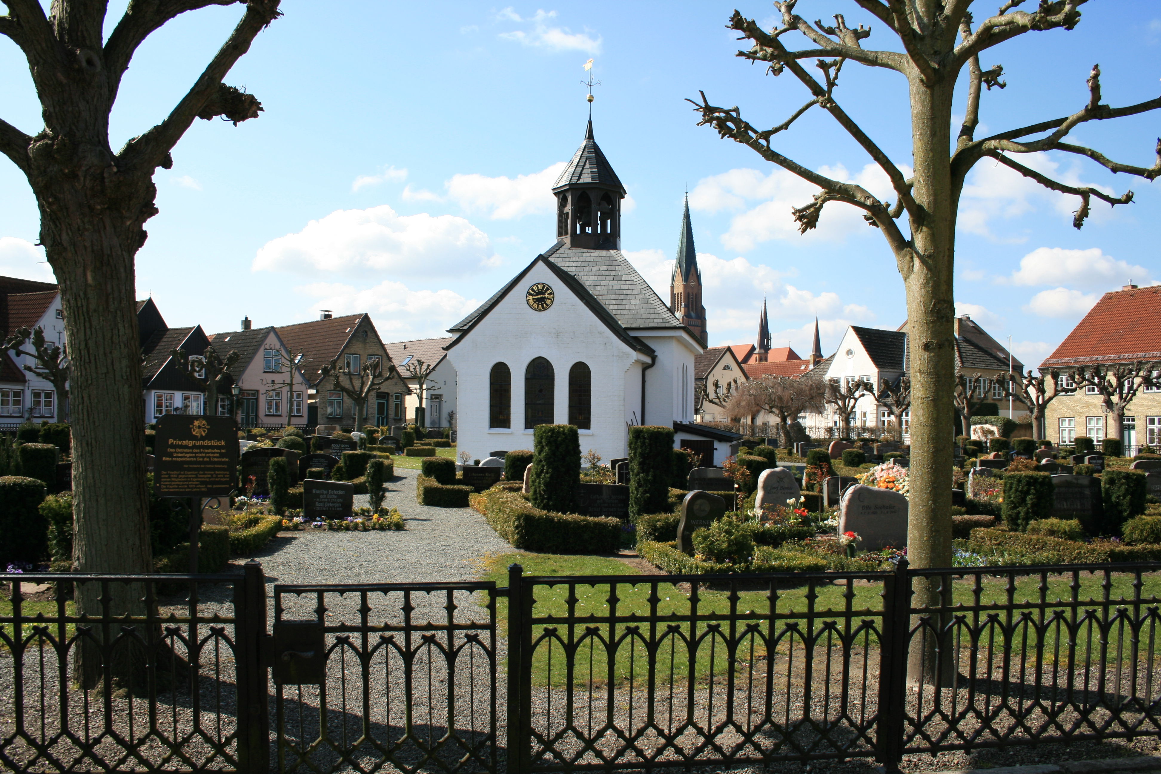 Schleswig Holmer Kapelle